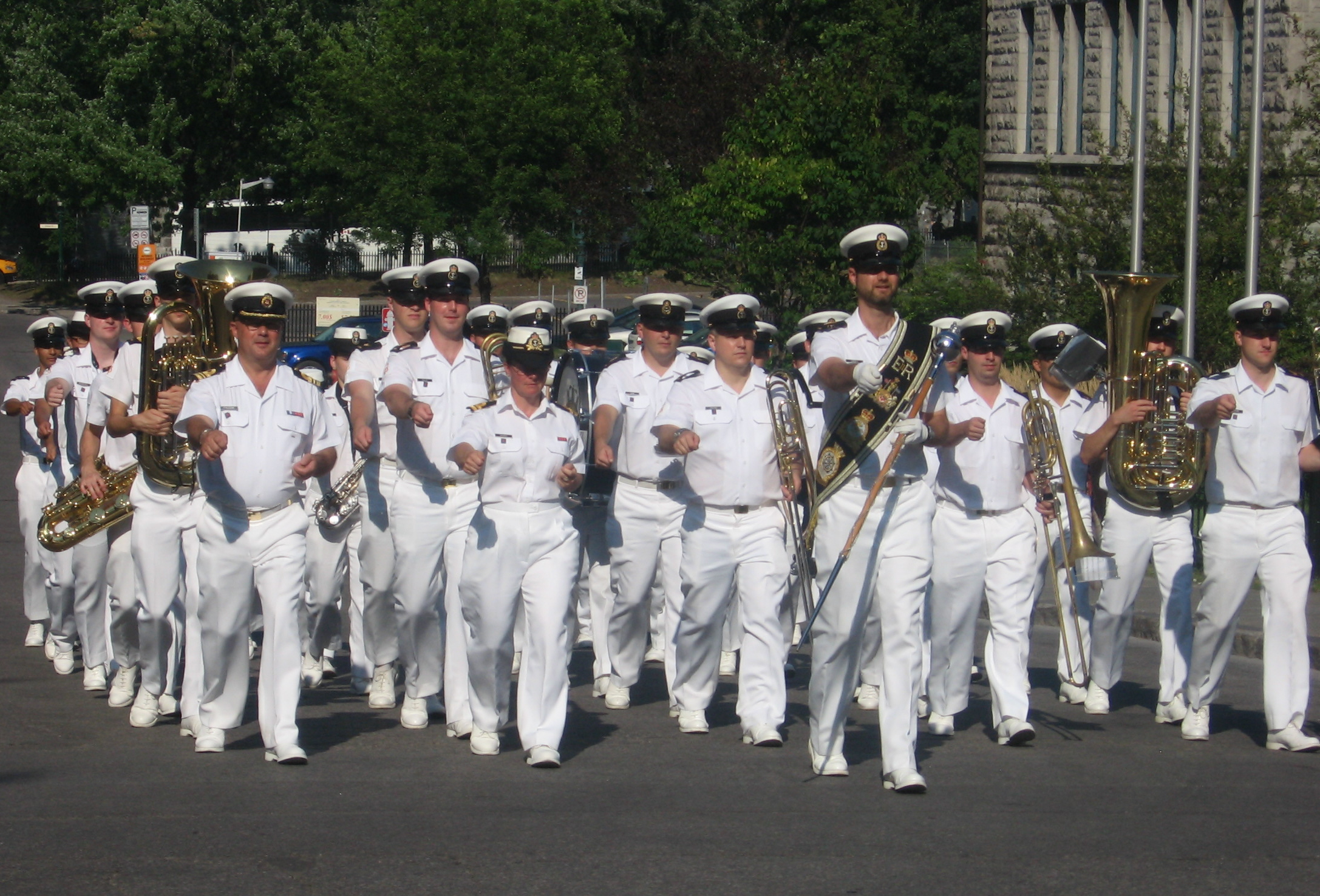 Voltigeurs de Québec